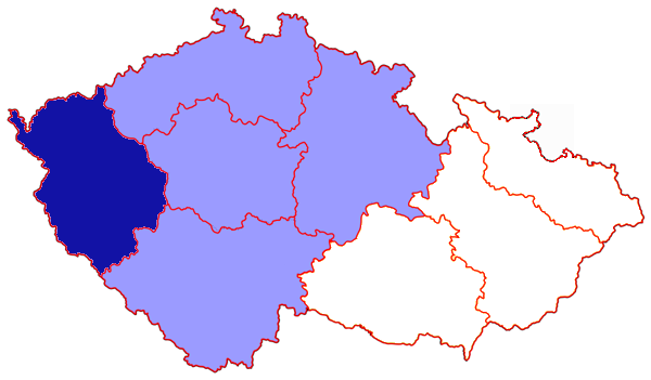 Mappa dell'arcidiocesi cattolica di Plzen, nella Repubblica Ceca. Lavoro personale.